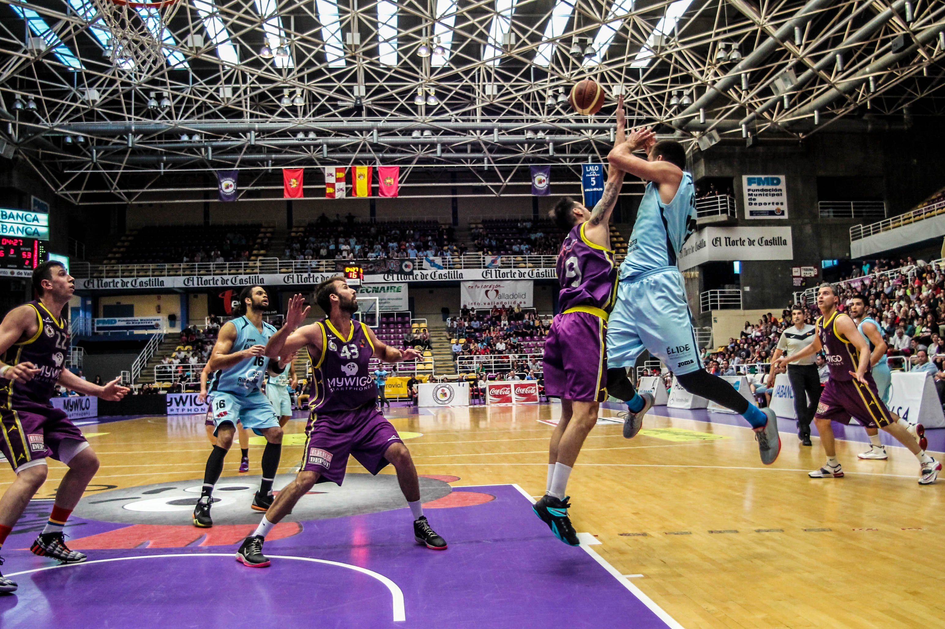 Partido entre C.B.Valladolid y C.B.Breogán en el polideportivo Pisuerga en Valladolid.